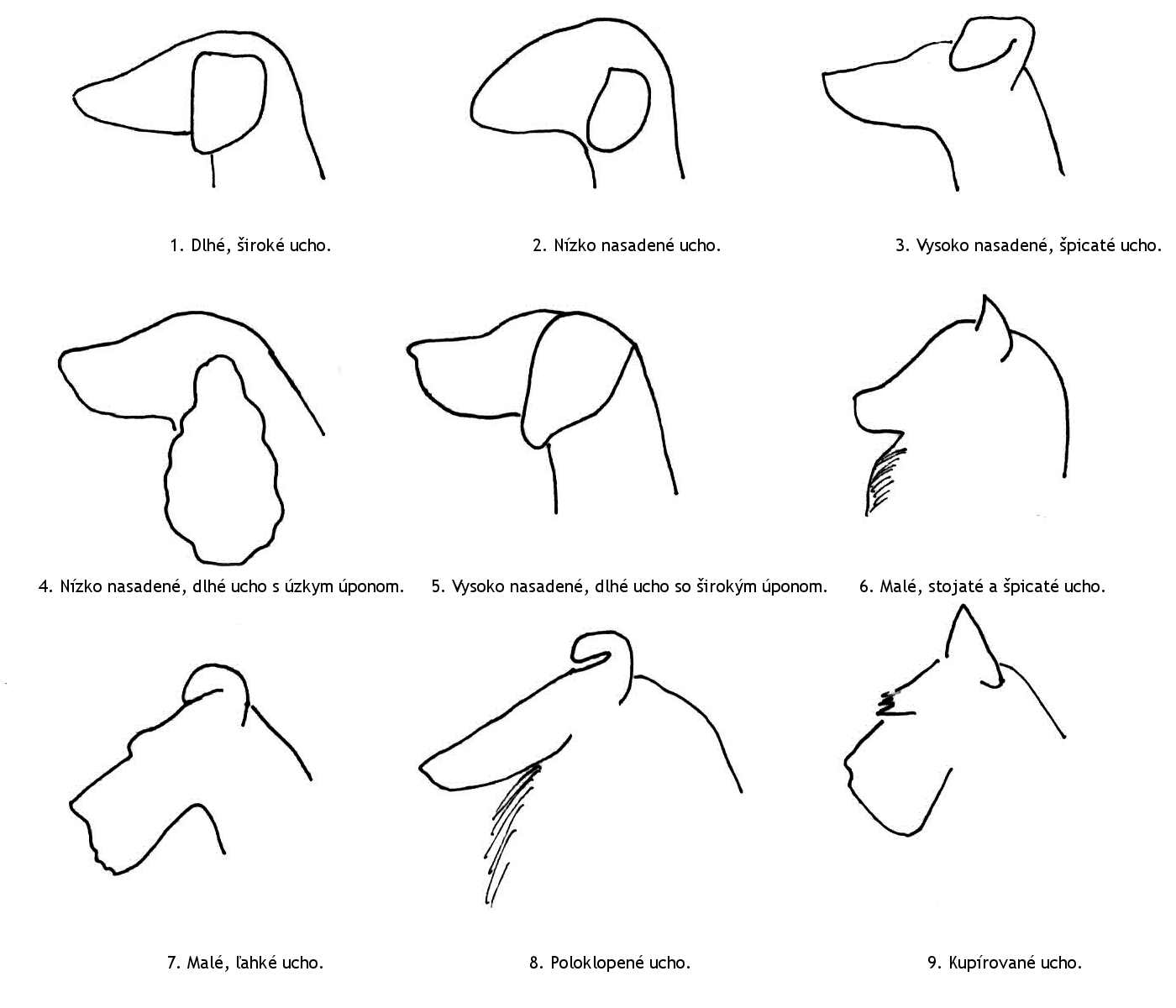 Popis: Typ ucha u psa Zdroj: vlastný obrázok (inšpirované podľa obrázkov str. 18 knihy: Najman, J.; Novotný, J.: Atlas plemen psů. Státní zemědělské nakladatelství Praha. 1973. ISBN 07-035-73) Dátum: 2.1.2006 Autor: Prskavka Povolenie: PD Iné verzie tohto súboru: nie